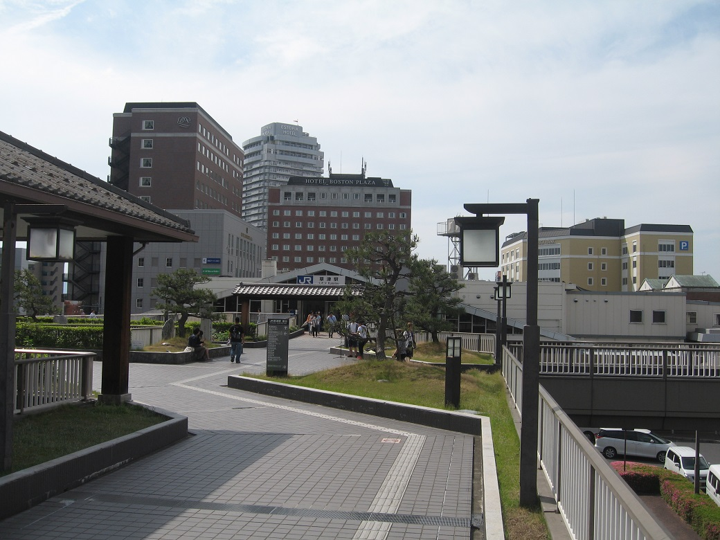 草津駅前風景 ペデストリアンデッキより